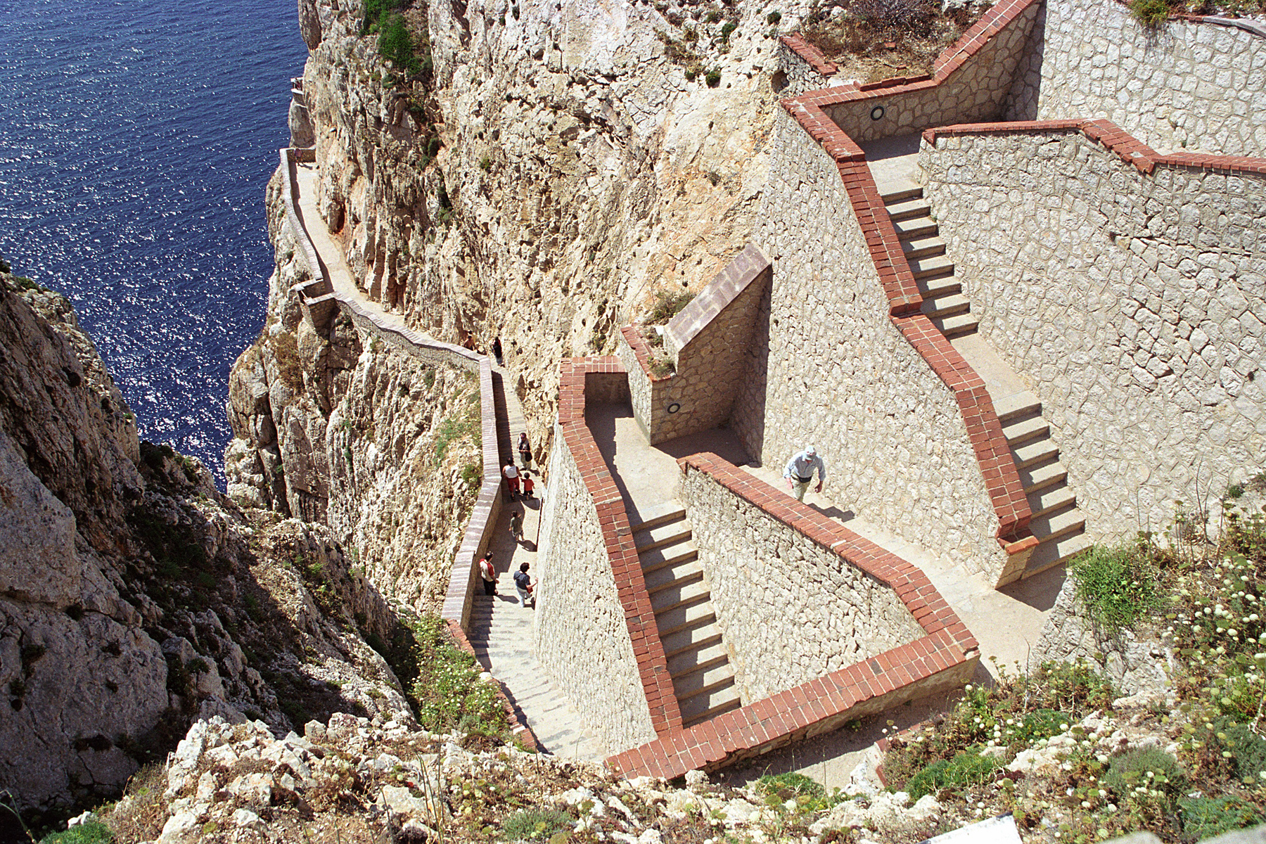 Capo Caccia : Alghero, Sardinia - Italy.